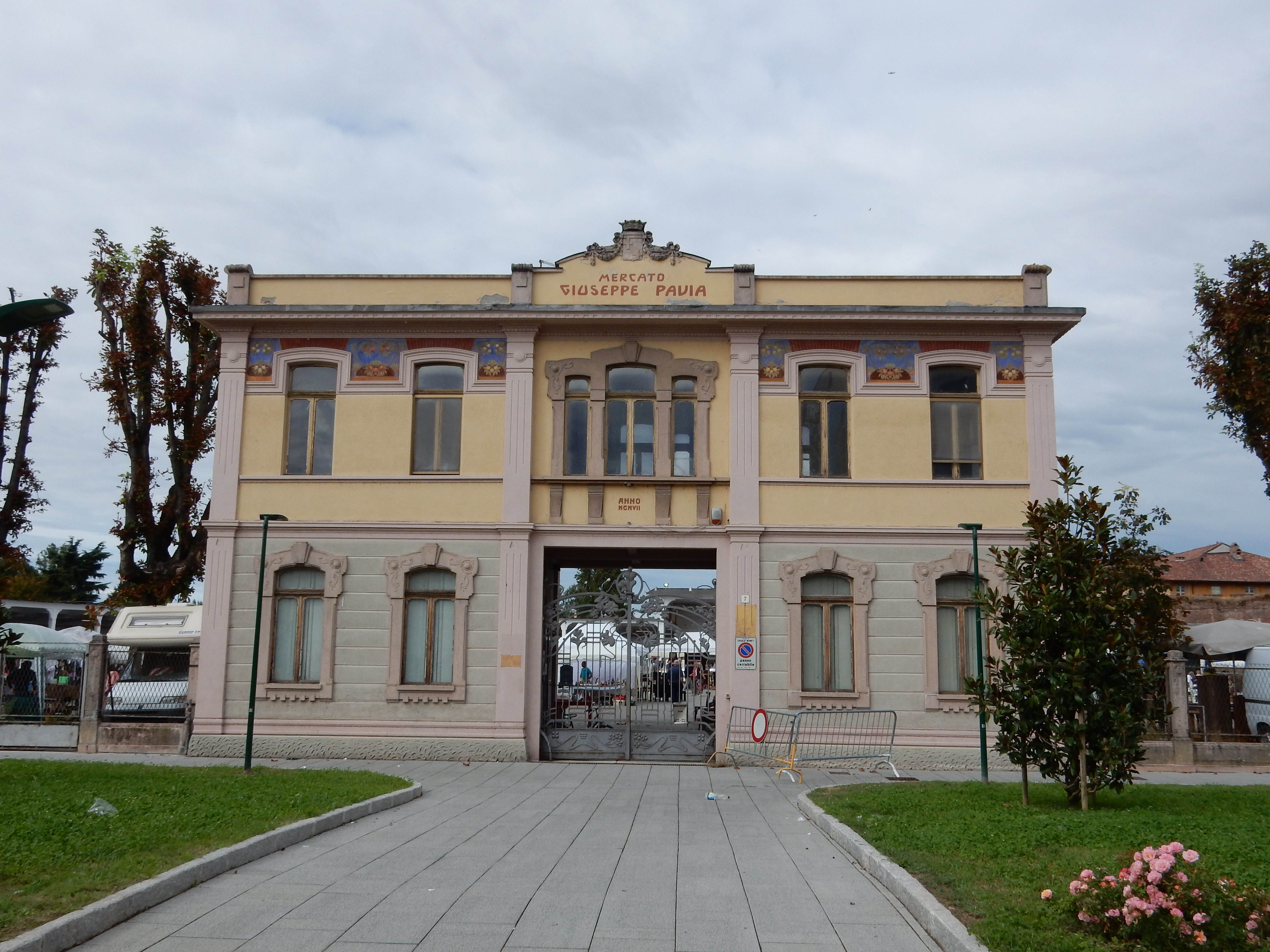 Ingresso area mercato antiquariato